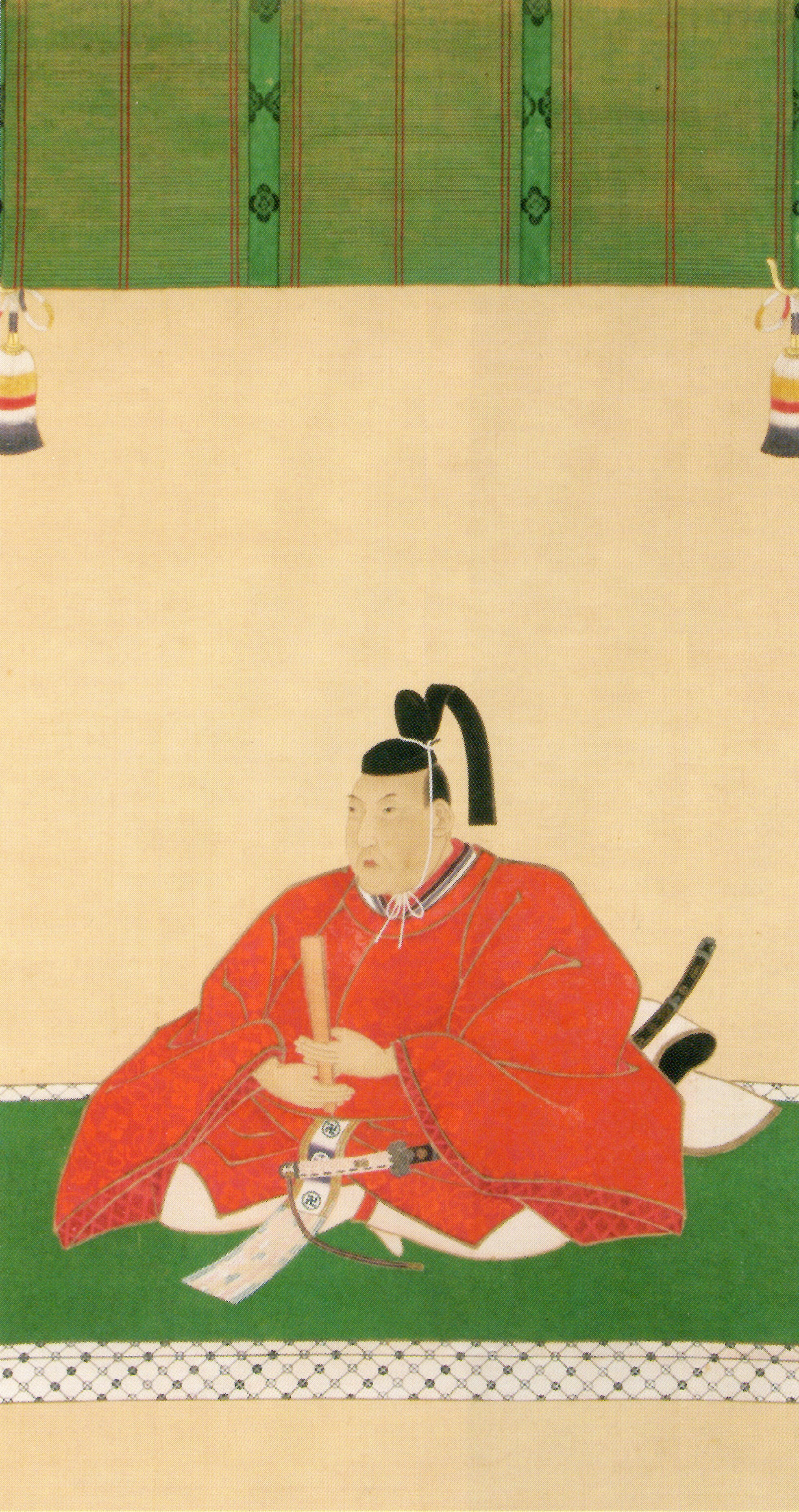 横山隆章の肖像。